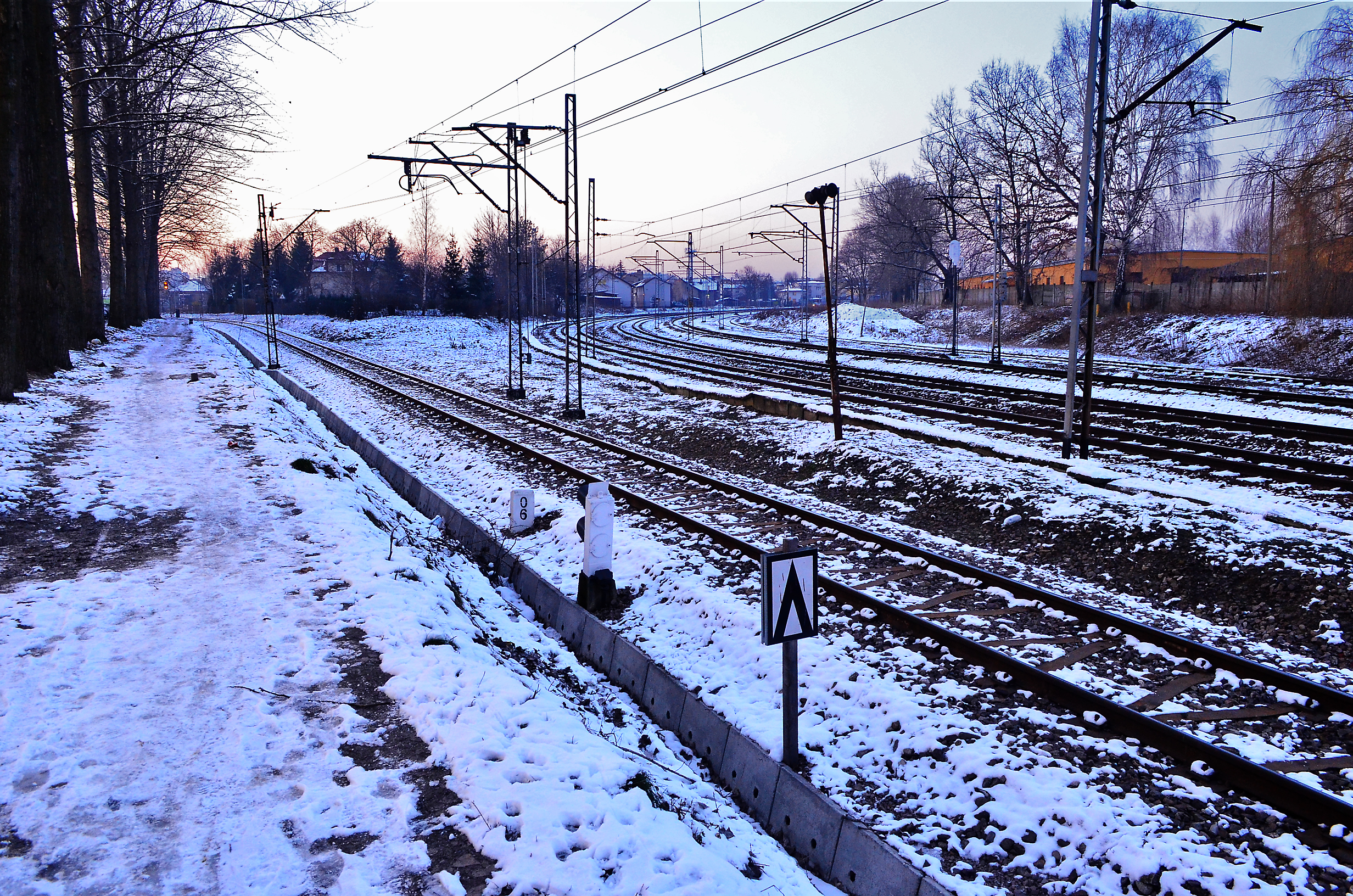 Rzeszów - widok na linie kolejowe (kolejno od lewej): do Jasła, Krakowa i Ocic.